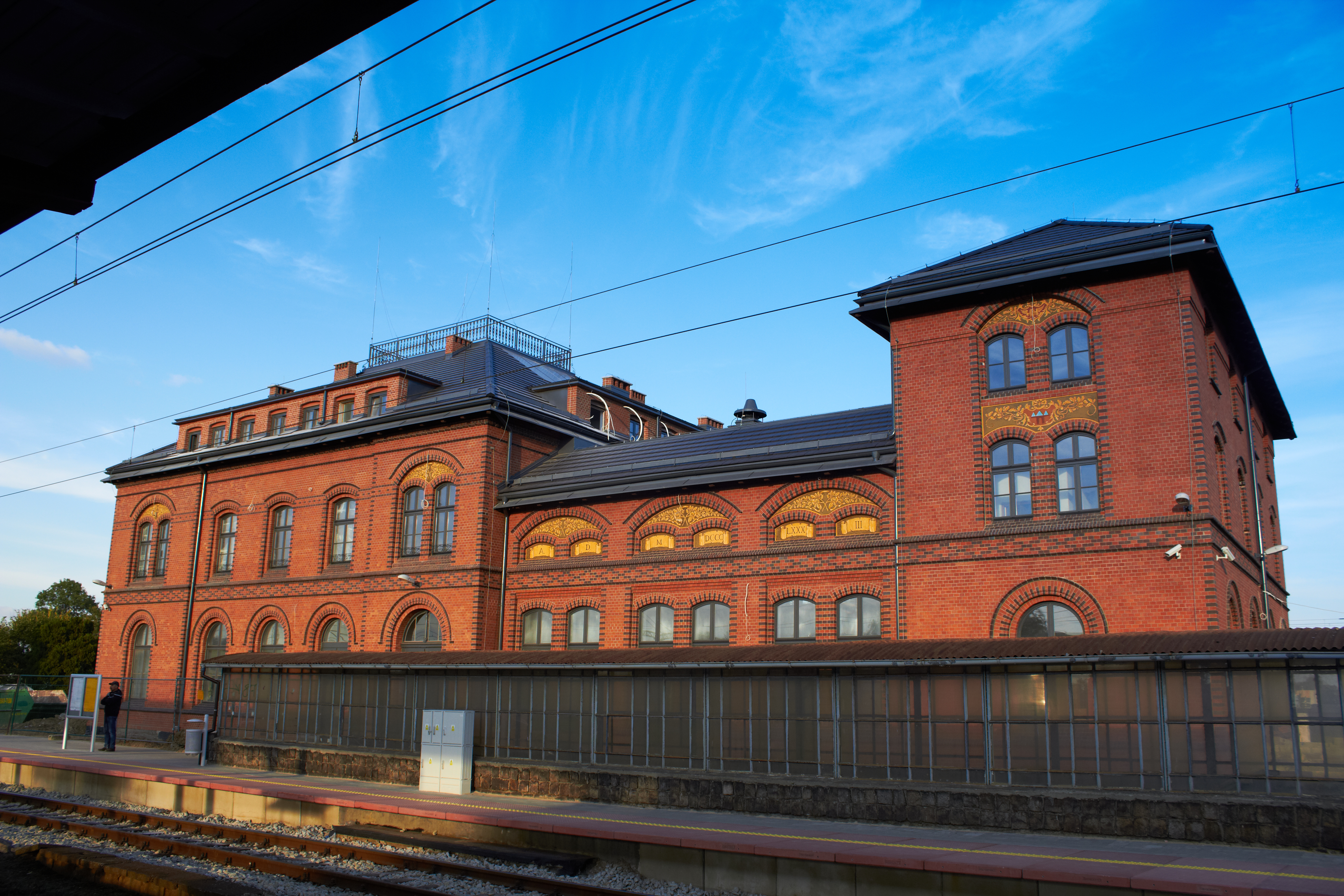 Jarocin, ul. Dworcowa - budynek dworca kolejowego, 1889-1890